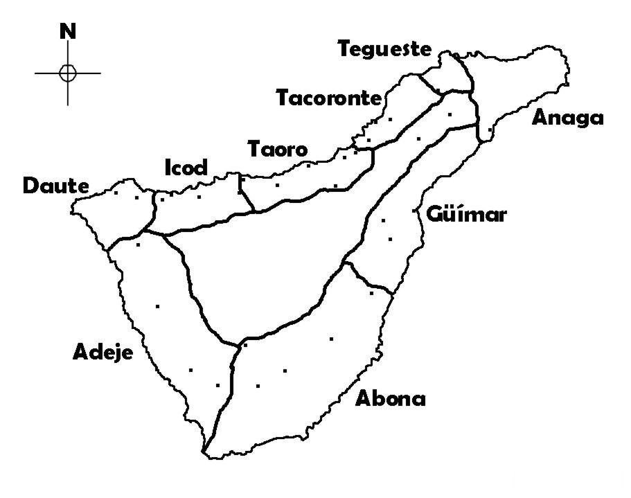 Reinos guanches de Tenerife. Los puntos corresponden a los núcleos urbanos de los actuales municipios. Elaboración propia en base al mapa de Luis Diego Cuscoy en "Los Guanches: vida y cultura del primitivo habitante de Tenerife".